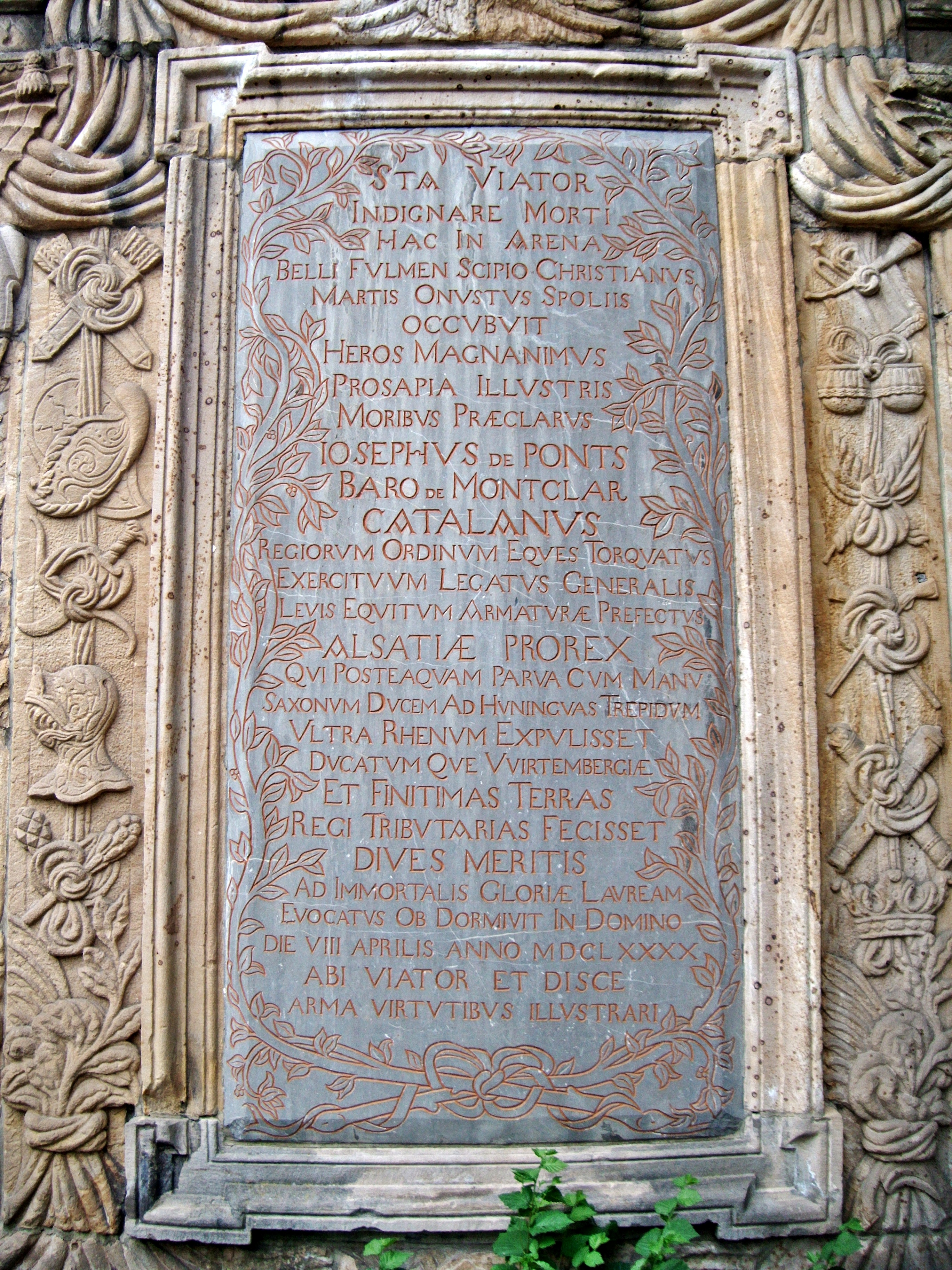 Inschrift vom Grab des Generals Joseph de Montclar (1625-1690), Französisches Tor, Landau in der Pfalz